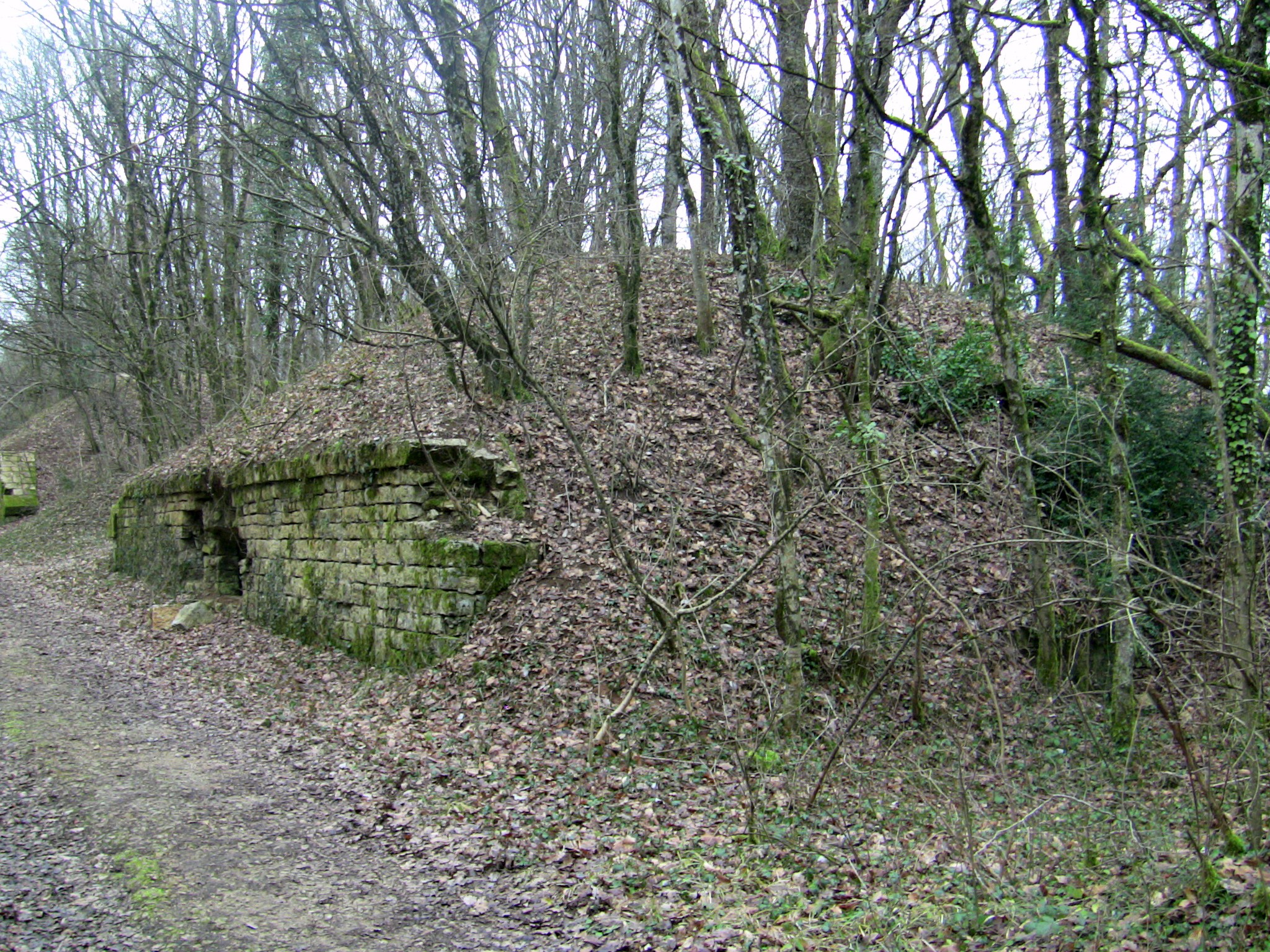 La traverse-abri III de la batterie ouest du fort de Planoise, à Besançon (Doubs, France).